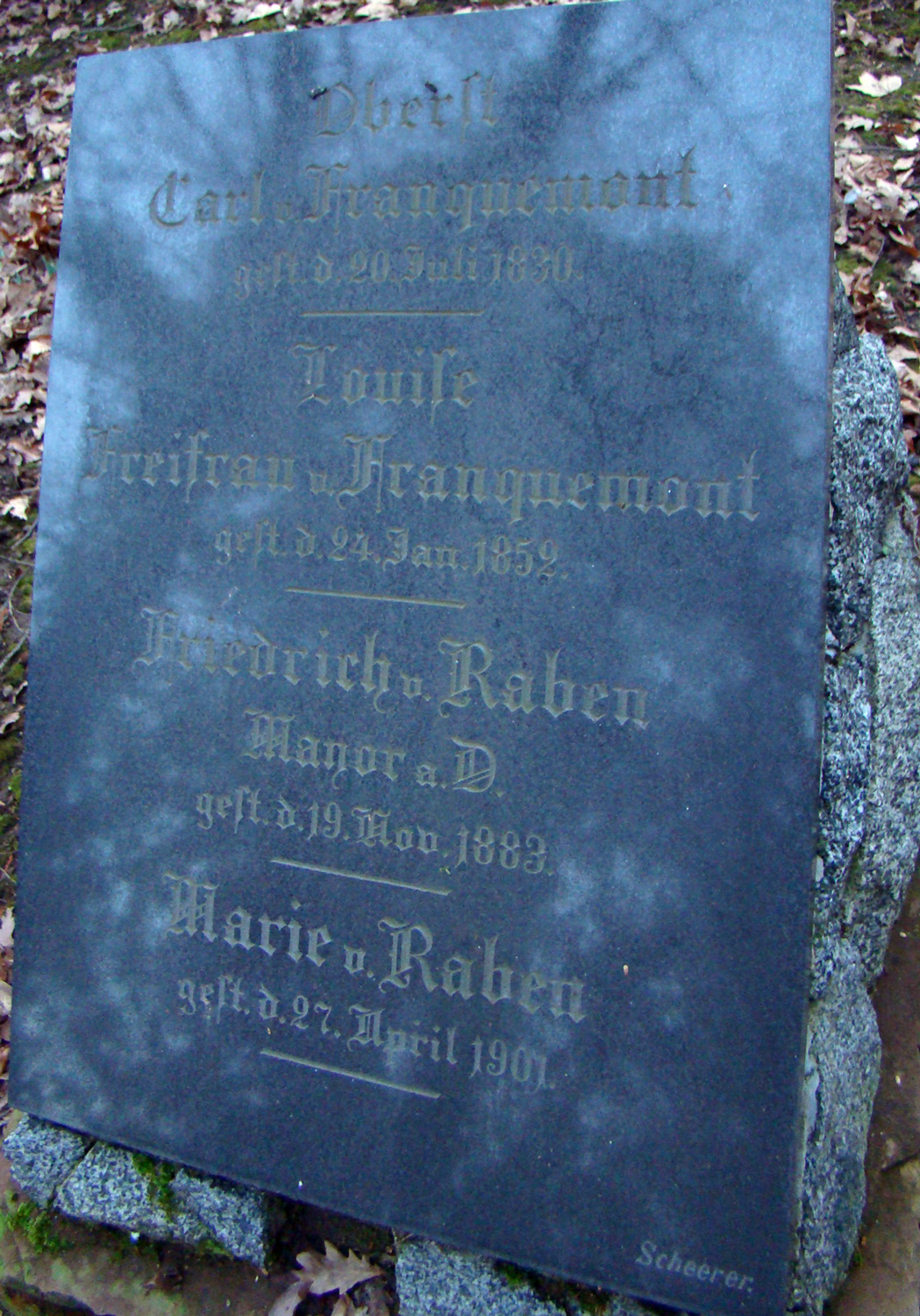 Alter Friedhof in Ludwigsburg, Grabmal von Franquemont/von Raben